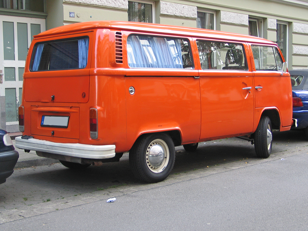 VW Transporter T2b